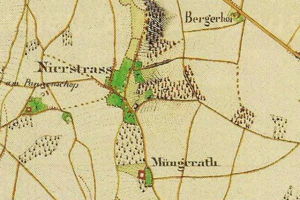 Preußische Kartenaufnahme 1846 - Uraufnahme - (5002 Geilenkirchen)